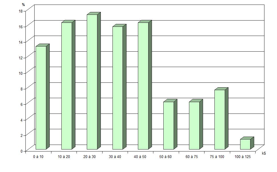 Distribution des revenus annuels par foyers, à Hartford (Michigan), en 2009.